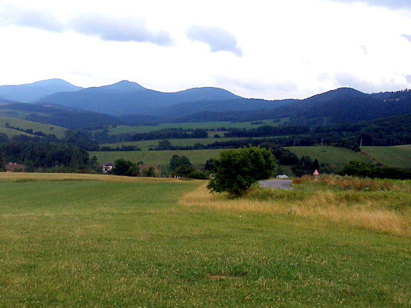 Pohorie Čierna hora pohľad od obce Klenov